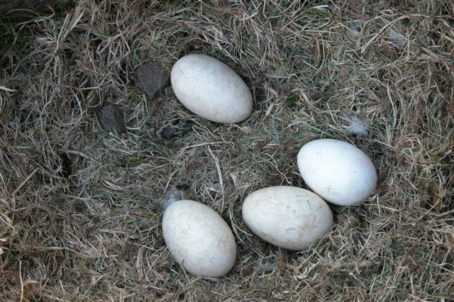 Æg fra en færøsk gås